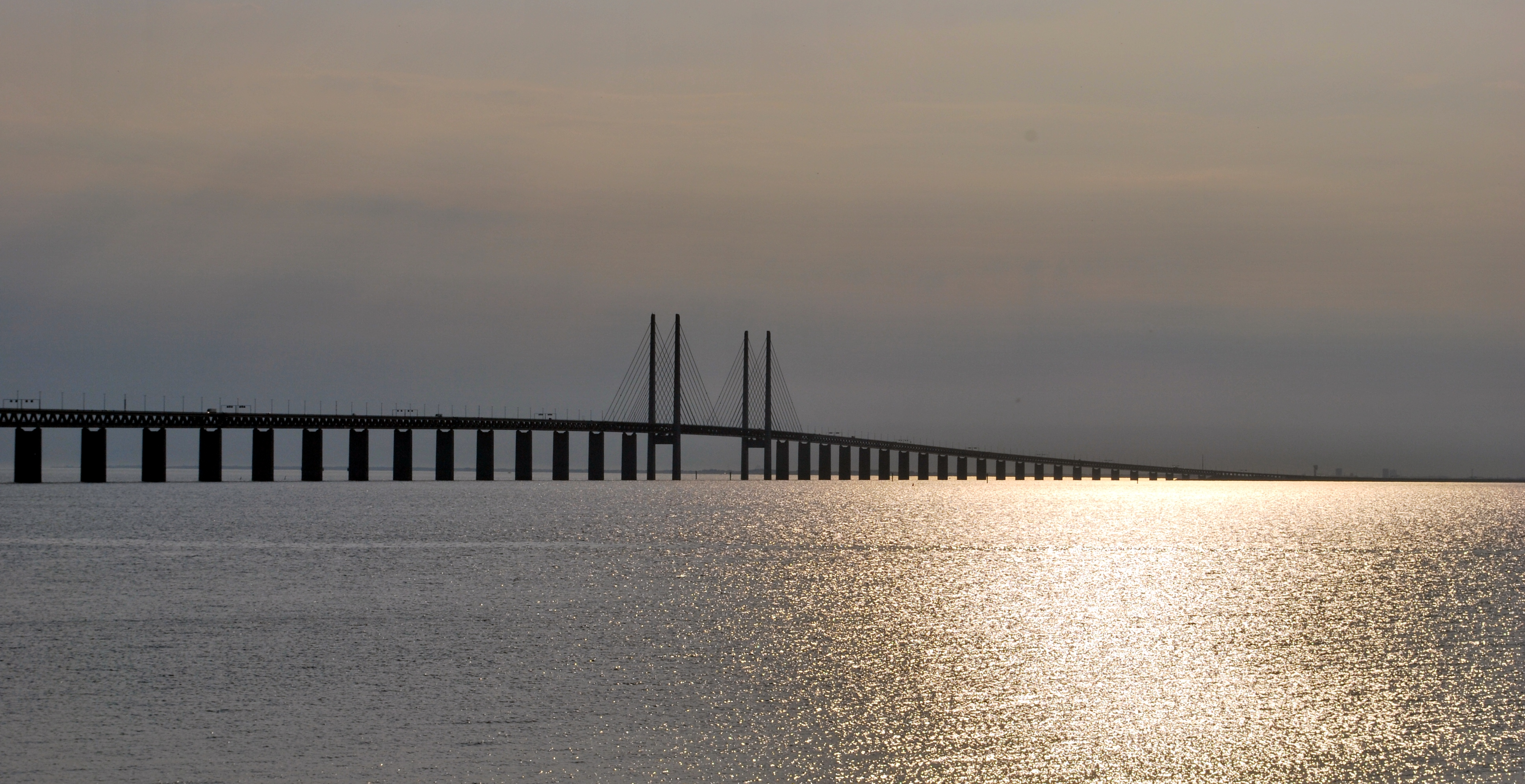 Øresund Bridge - Øresund